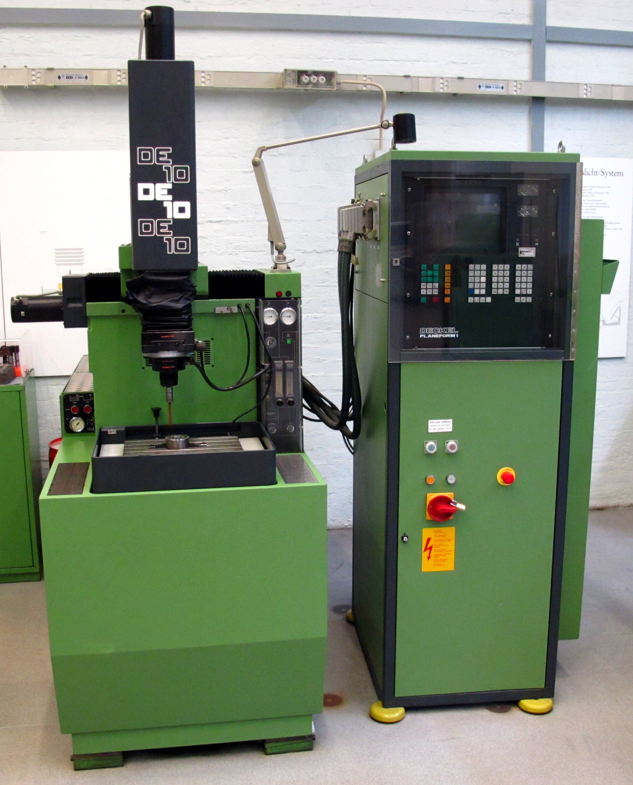 Moderne Funkenerodiermaschine